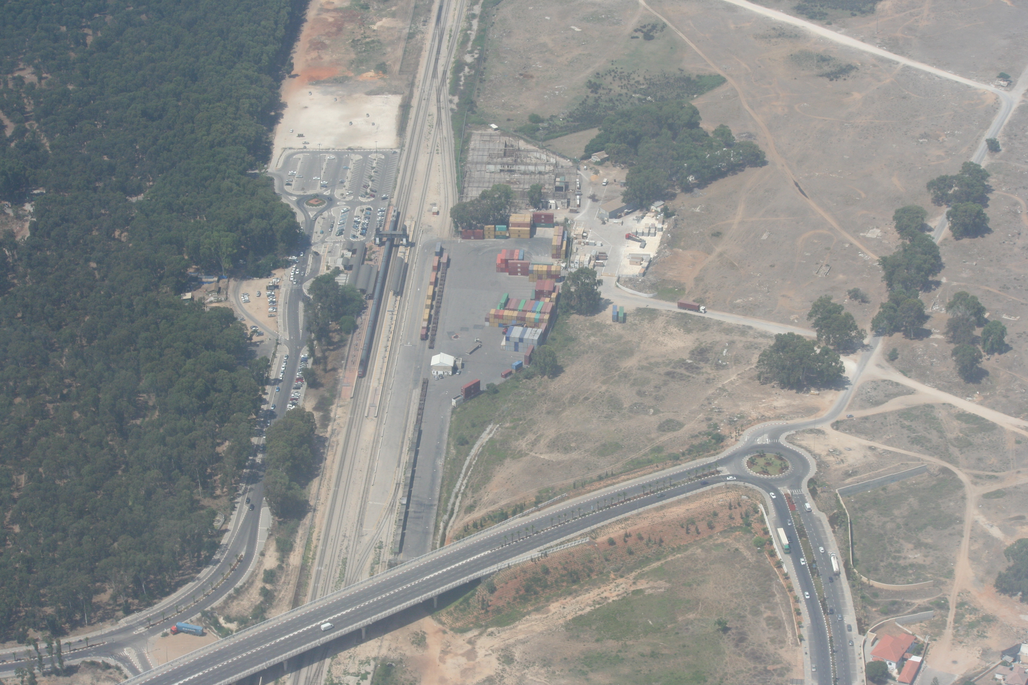 תחנת הרכבת ומסוף המכולות בחדרה